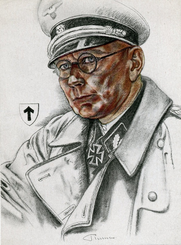 Georg Keppler, gezeichnet als Oberführer der Waffen-SS, Träger des Ritterkreuzes. Kreide